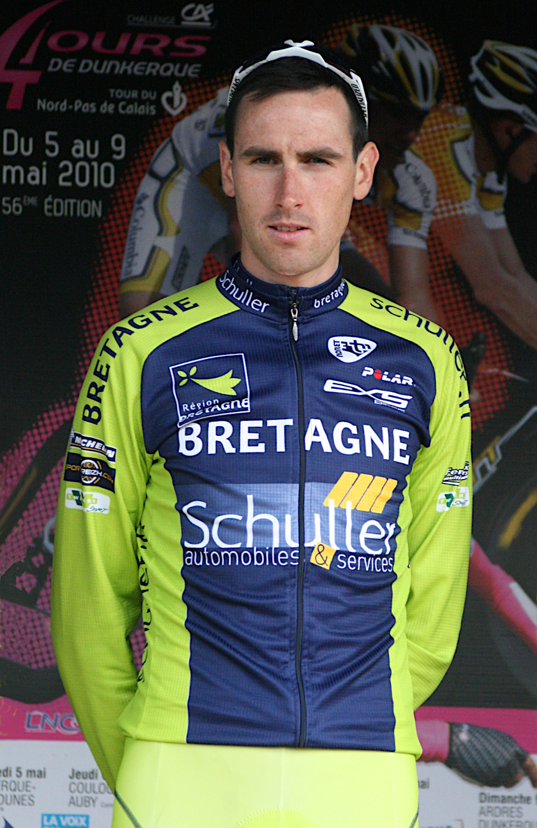 Jean-Marc Bideau lors de la présentation des équipes des 4 jours de Dunkerque 2010